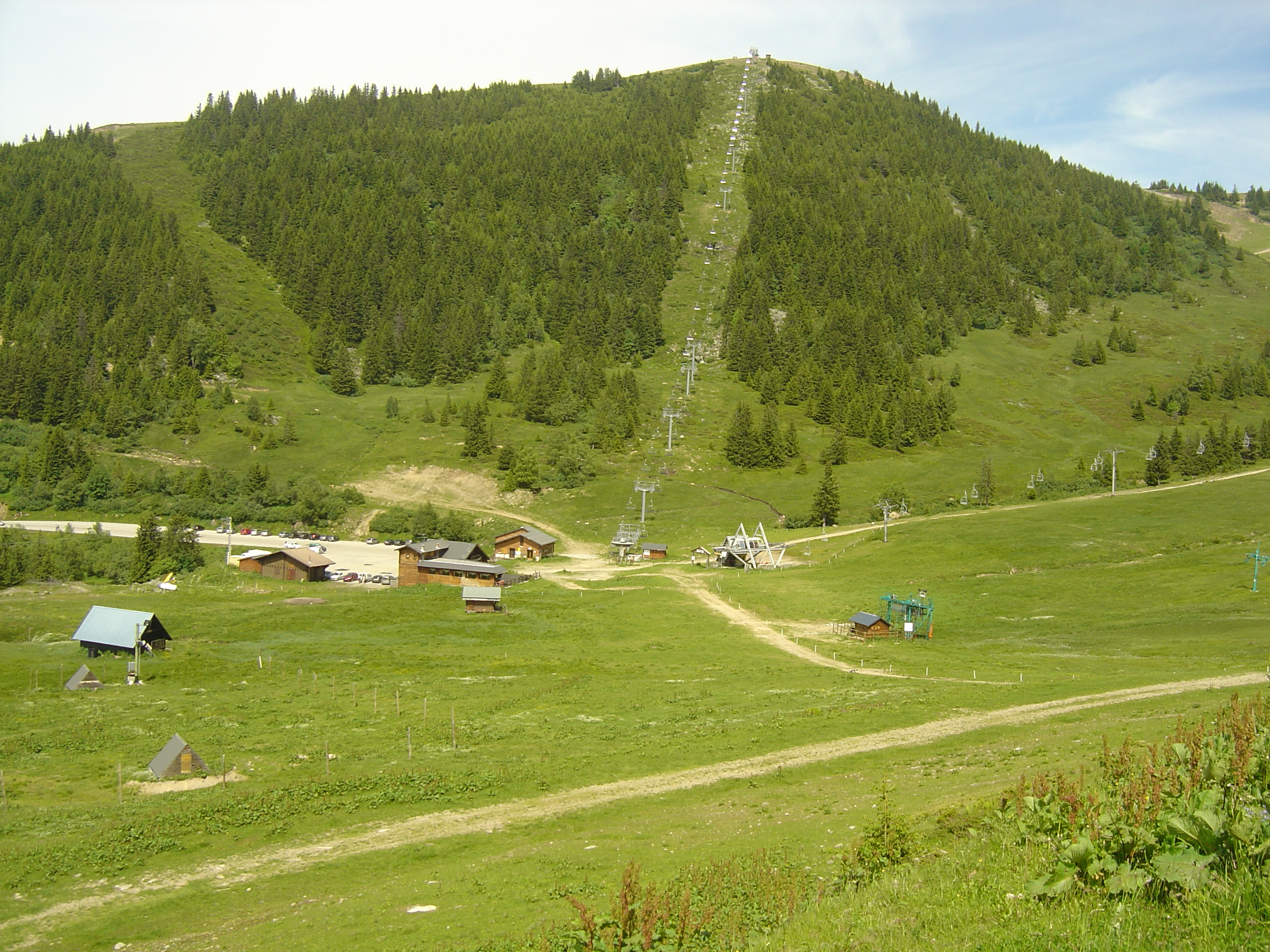 Station du Super Collet (1630m) qui prolonge celle du Collet d'Allevard (1450m)